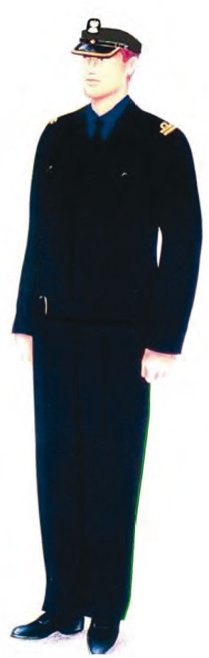 Ubiór służbowy SG funkcjonariuszy noszących umundurowanie MW z bluzą olimpijką, spodniami i czapką garnizonową.